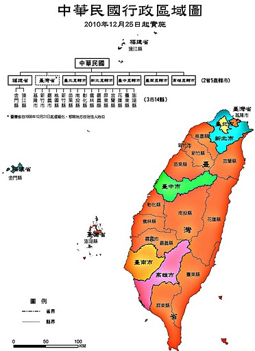 2010-12-25开始的中华民国行政图Bân-lâm-gú: 2010nî 10-gue̍h 25 khai-sí ê Tiong-huâ-bîn-kok hîng-tsìng-tôo. 2010年12月25開始的中華民國行政圖。